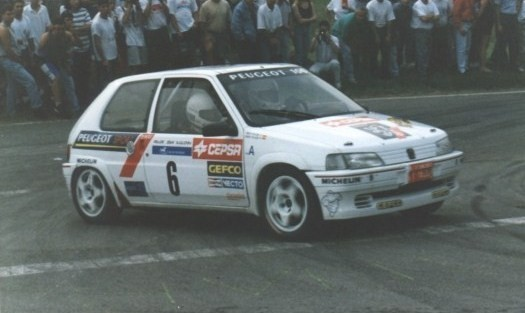 Sergio Vallejo en el Rallye San Agustín 1995